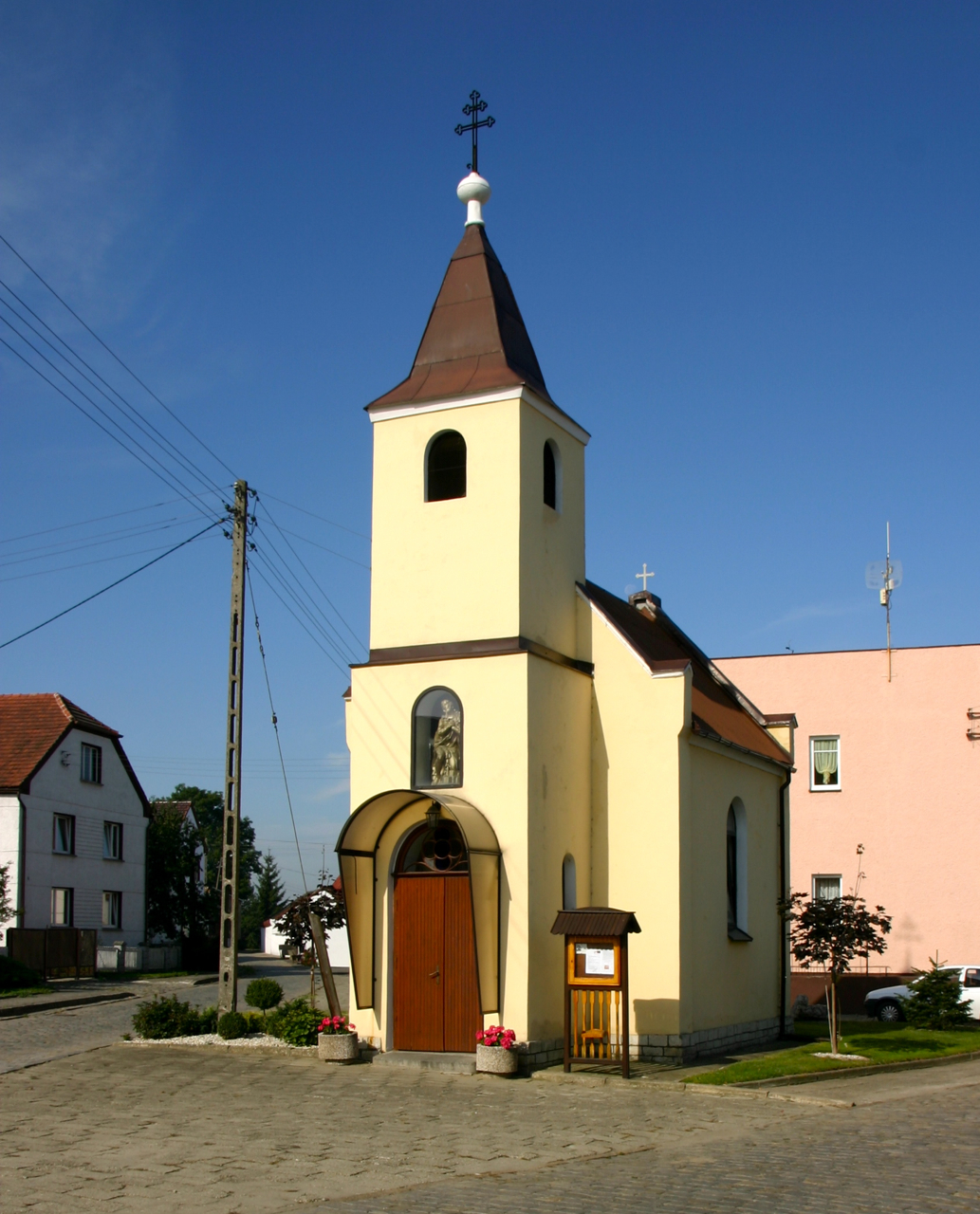 Mionów (dodatkowa nazwa w j. niem. Polnisch Müllmen) – wieś w Polsce położona w województwie opolskim, w w powiecie prudnickim, w gminie Głogówek.